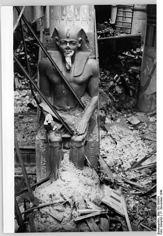 Berlin, Neues Museum, Ruine, Ägyptische Statue ADN-ZB Kümpfel Berlin: Auf der Museumsinsel werden jetzt die durch Kriegseinwirkungen beschädigten Kunstwerke restauriert. Aus Schutt und Asche des Neuen Museums schaut ein alter ägyptischer Pharao heraus. Aufnahme 17.11.1949 4460-49